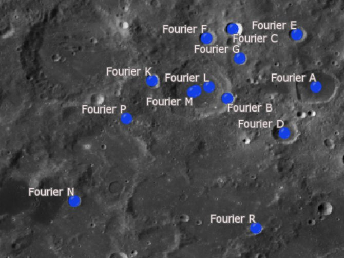 Cráter lunar Fourier. Cráteres satélite. (Imagen LRO)